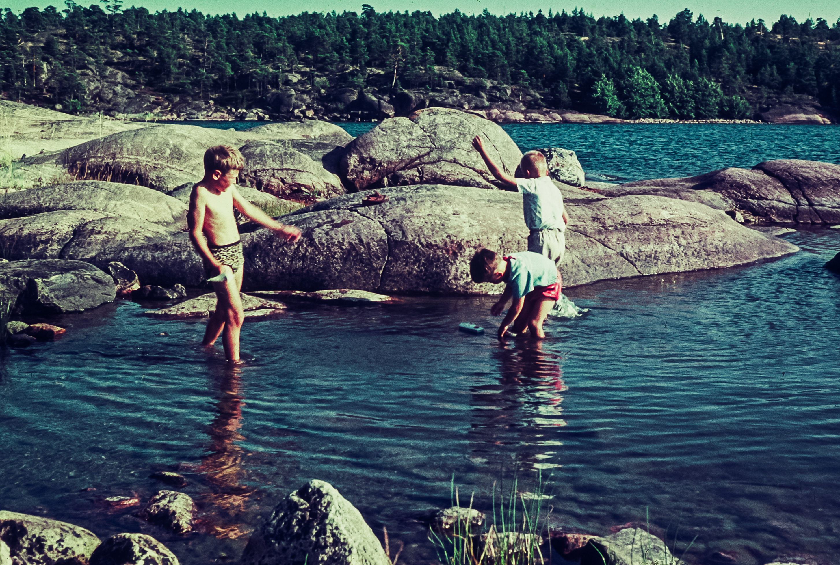 Lek med båtar på holmen Kolkan vid Vandrock i augusti 1957. Från vänster Pontus och Rufus Lidberg samt Lasse Svahnström.